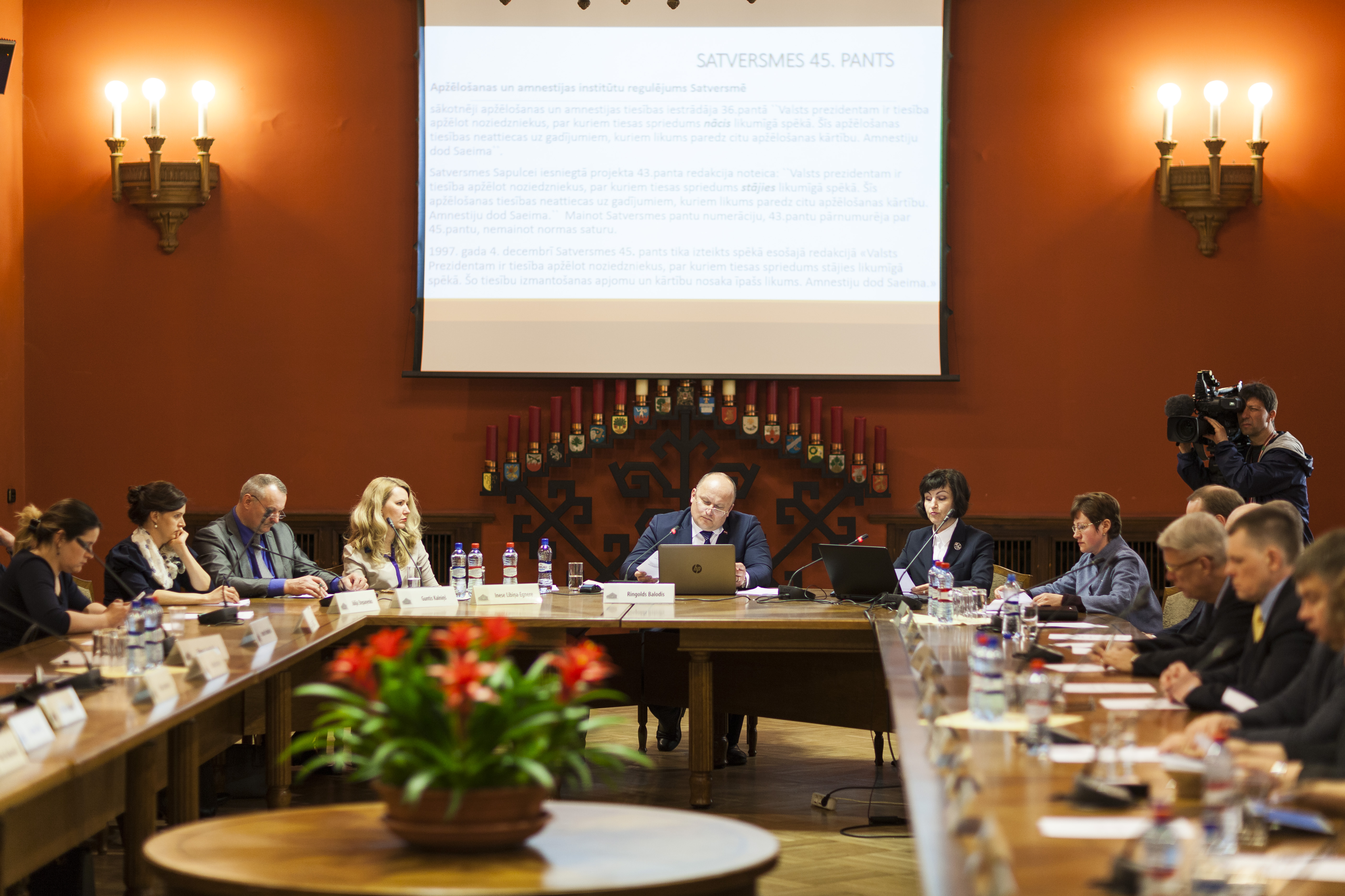 Darba grupas sēde 2016.gada 12.aprīlī